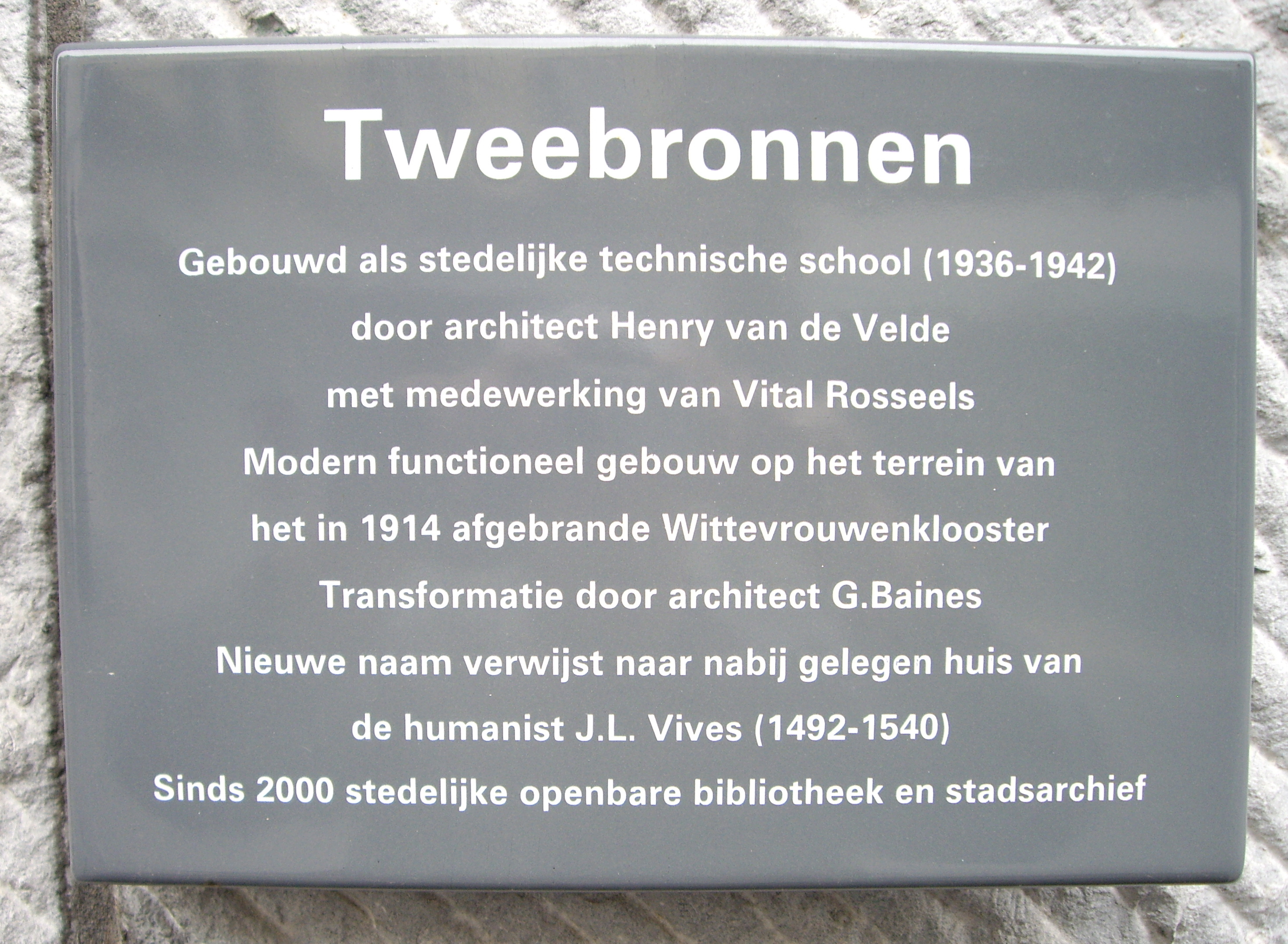 Plaque on the Tweebronnen library, Leuven